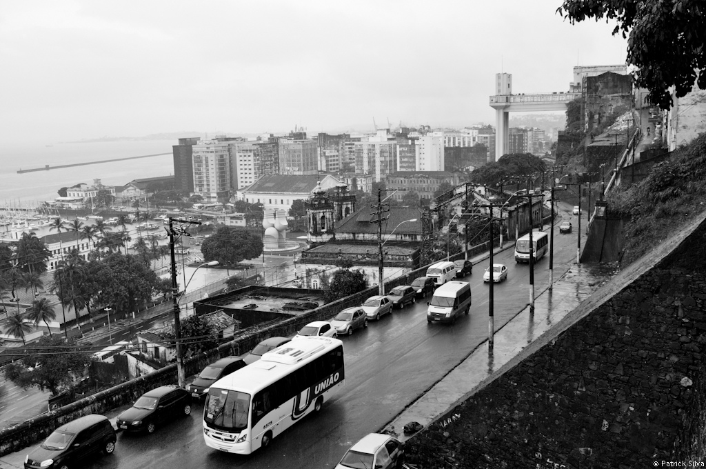 Ladeira da Montanha: A primavera começou chuvosa em Salvador. Sofrendo os efeitos do fenômeno climático La Niña, a população da cidade tem enfrentado dias de muito transtorno, congestionamento e deslizamentos de terra em bairros da periferia.